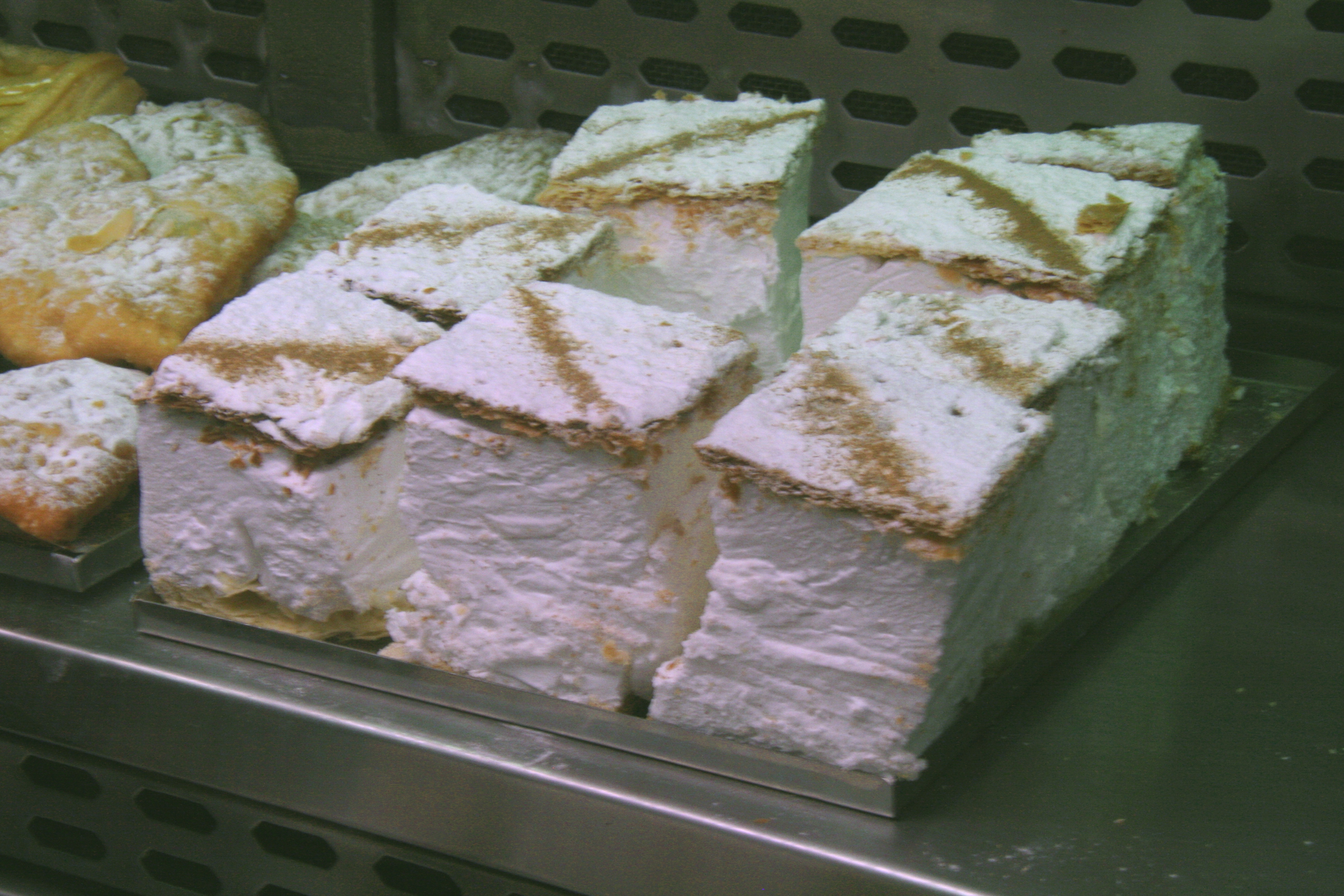 Milhojas